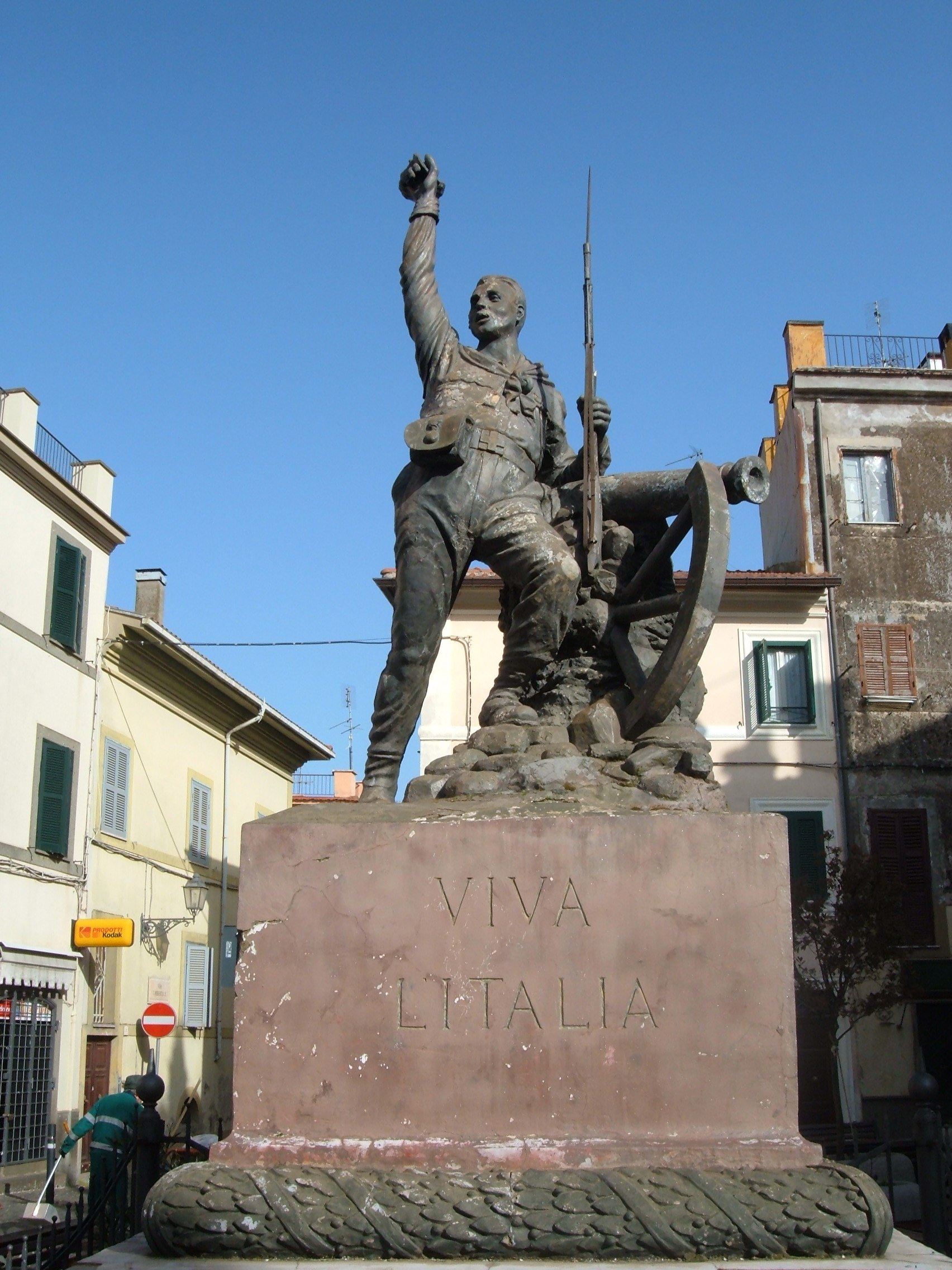 Statua del Garibaldino a Monte Porzio Catone.